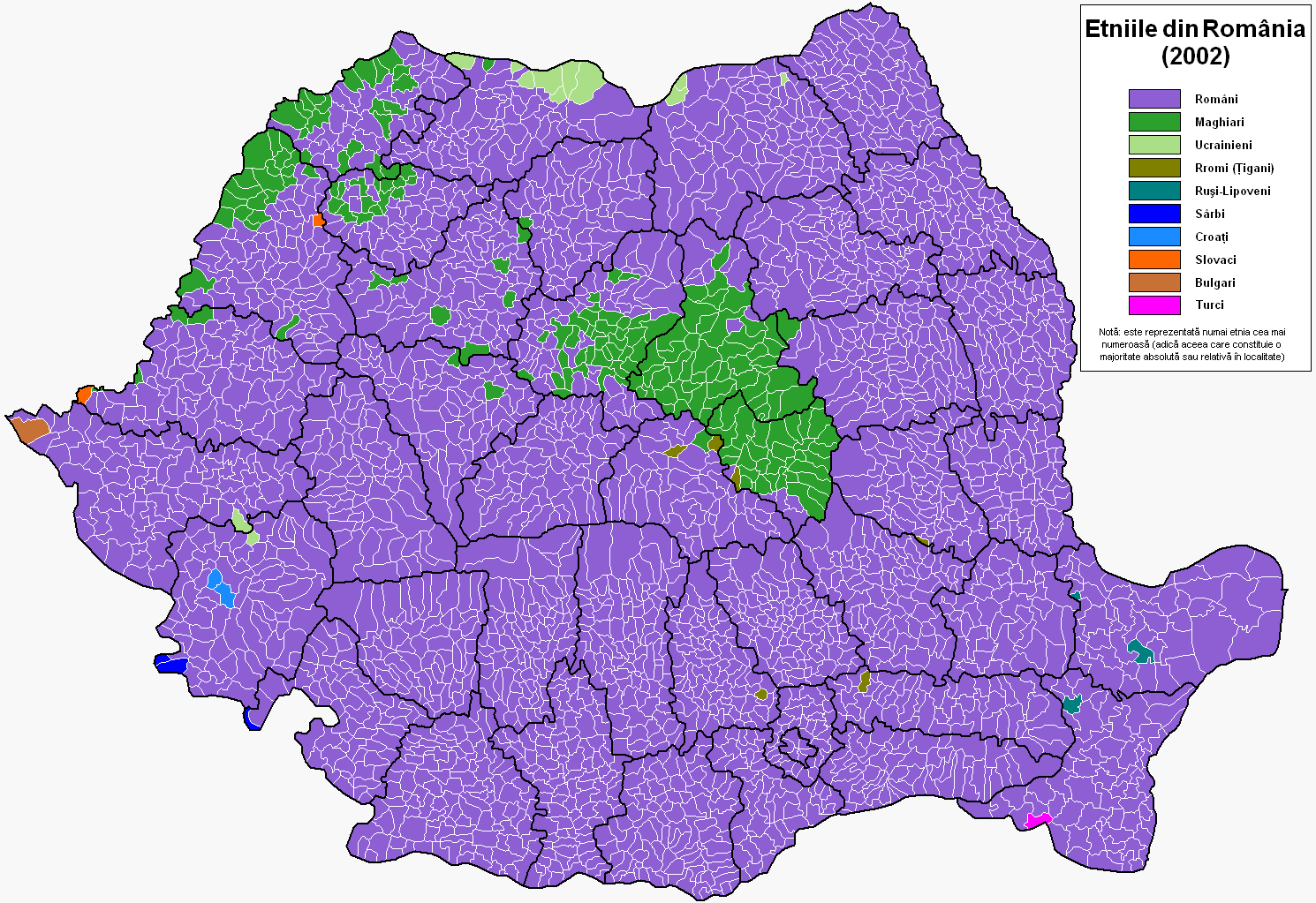 Harta etnica (2002).